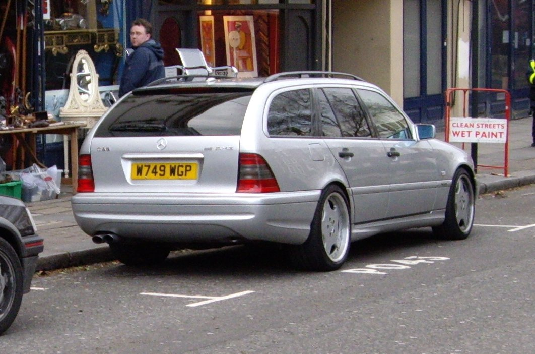 AMG C55 Estate